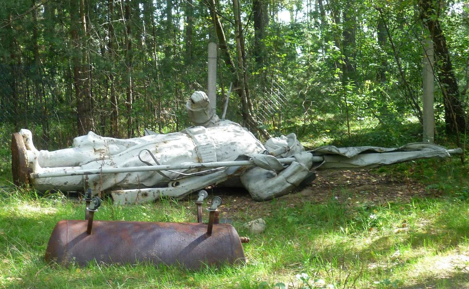 Das Sowjetische Ehrenmal, das bekannteste Denkmal in Neustrelitz, das bis 1994 auf dem Marktplatz stand. Es besteht aus Metall und wurde von einem Künstler der DDR geschaffen. Ort: Neustrelitz, Lessingstraße 80